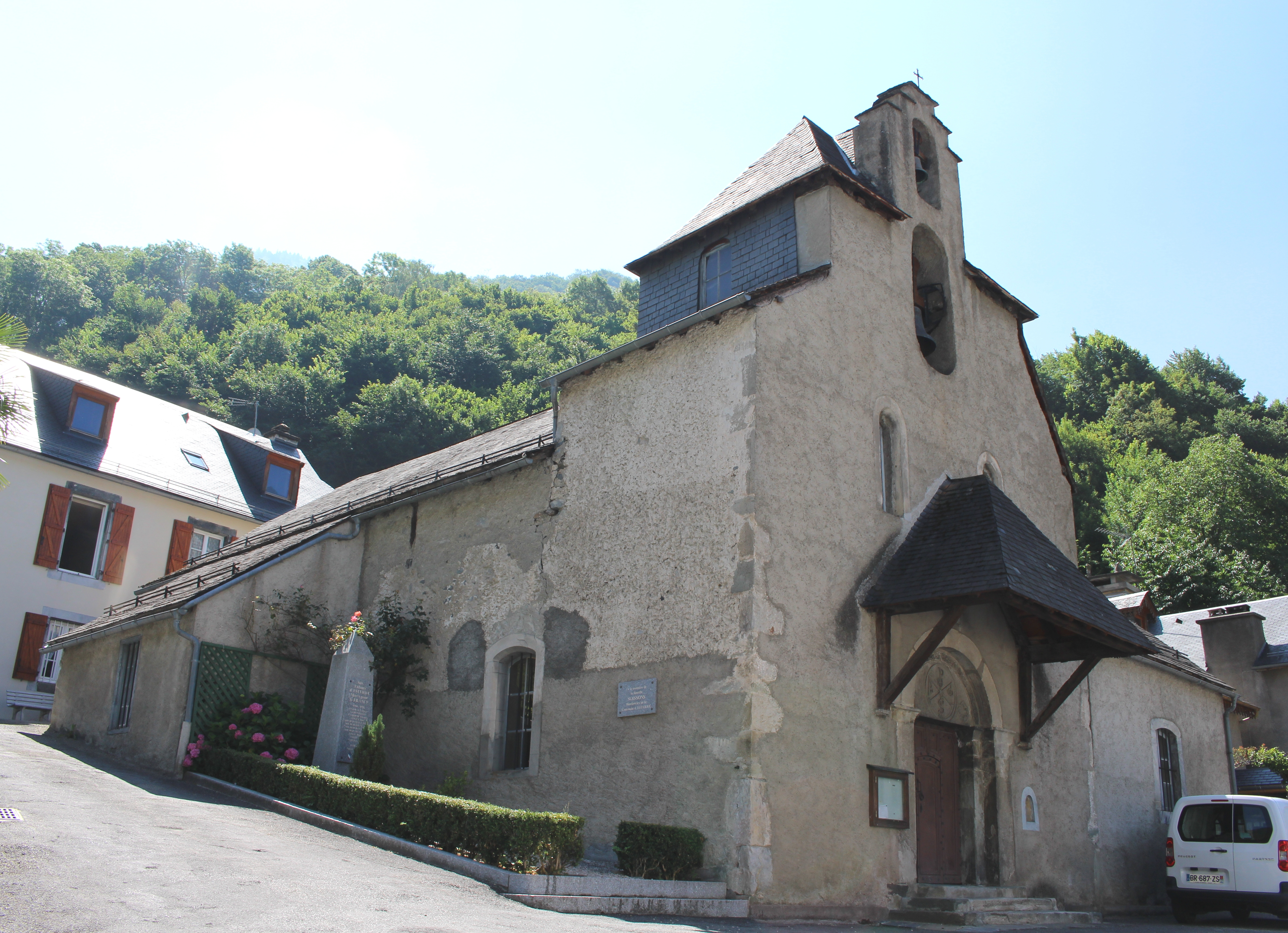 Église Saint-Étienne d'Esterre (Hautes-Pyrénées)